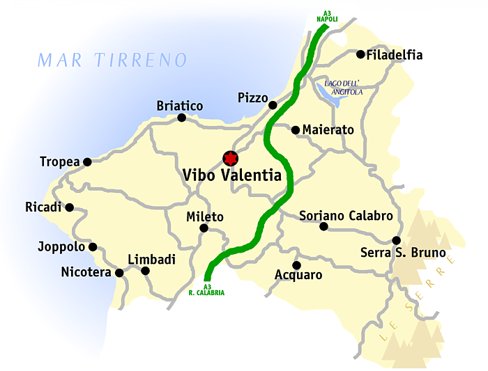 Provincia di Reggio Calabria, Provincia di Vibo Valentia